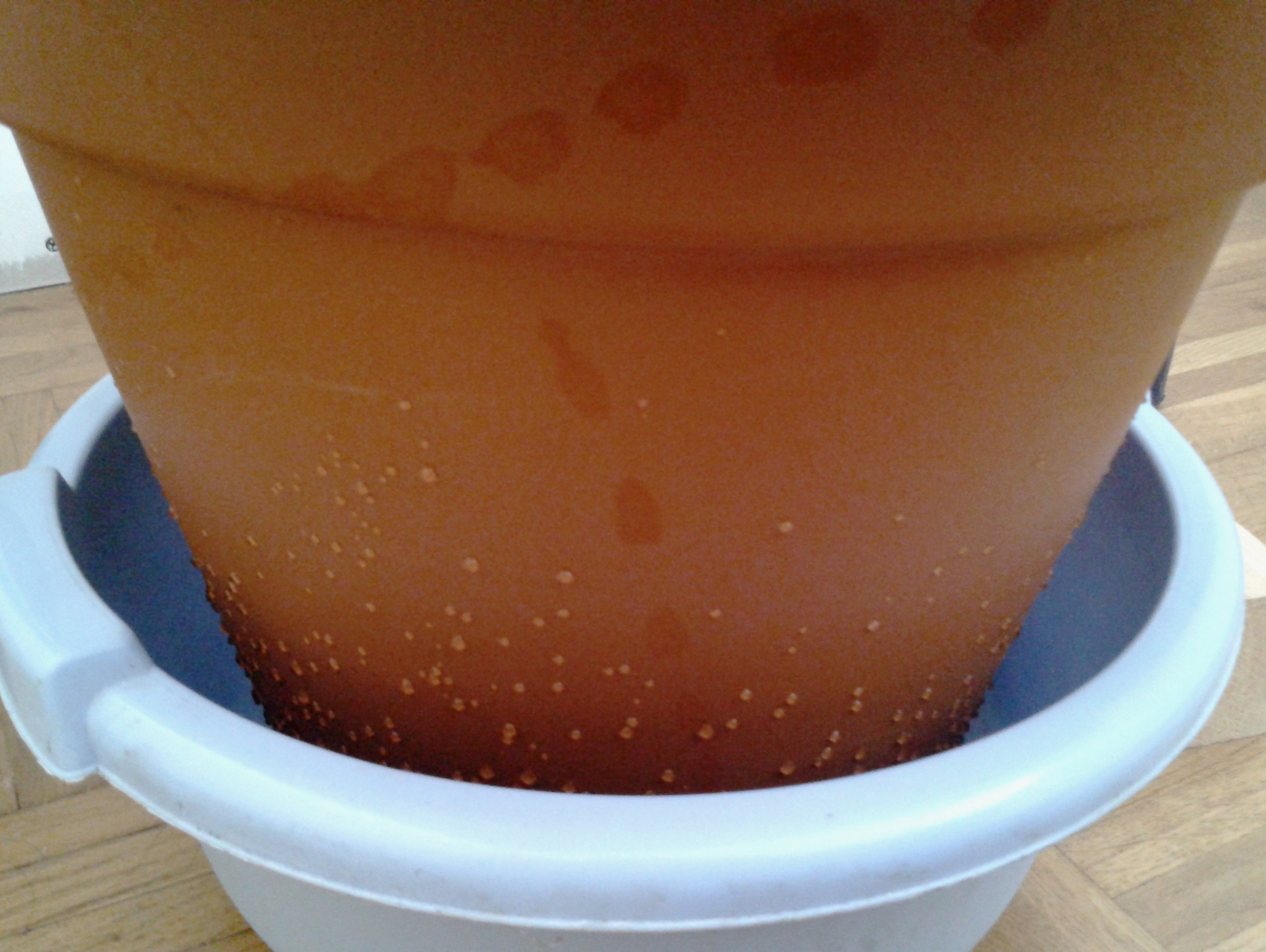 Observation de l'écoulement de l'eau à partir d'un pot de fleur de 10L, 1h après remplissage